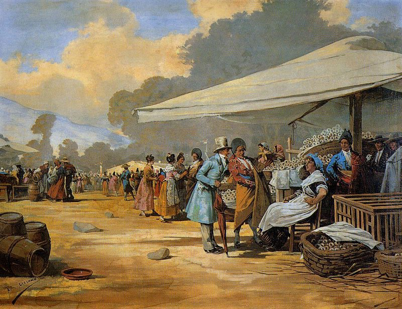 Las rosquillas del santo. Óleo sobre lienzo. 50 x 69 cm. Obra de Ángel Lizcano Monedero